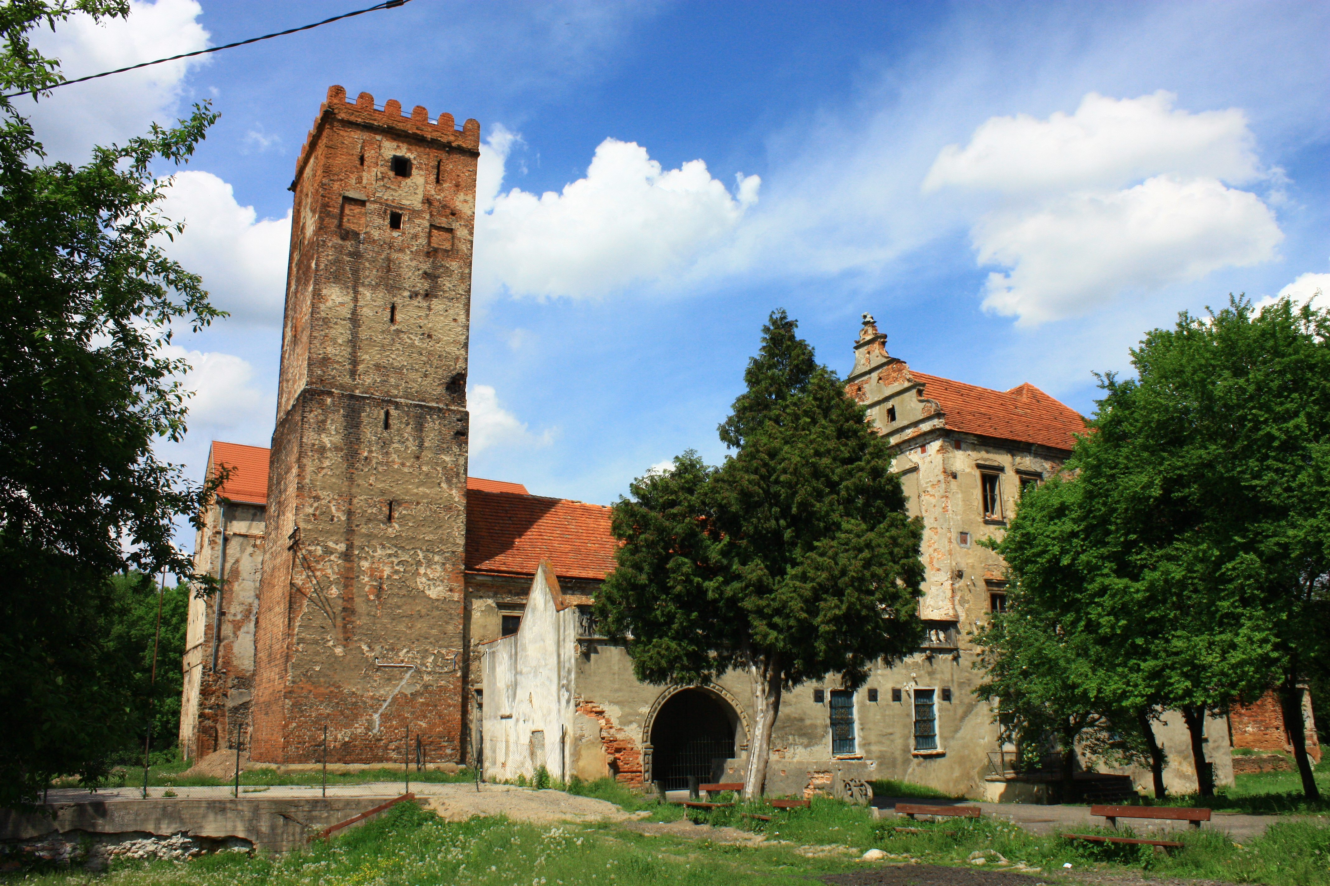 Prochowice, zespół zamkowy, XIII, XIV, XVIII